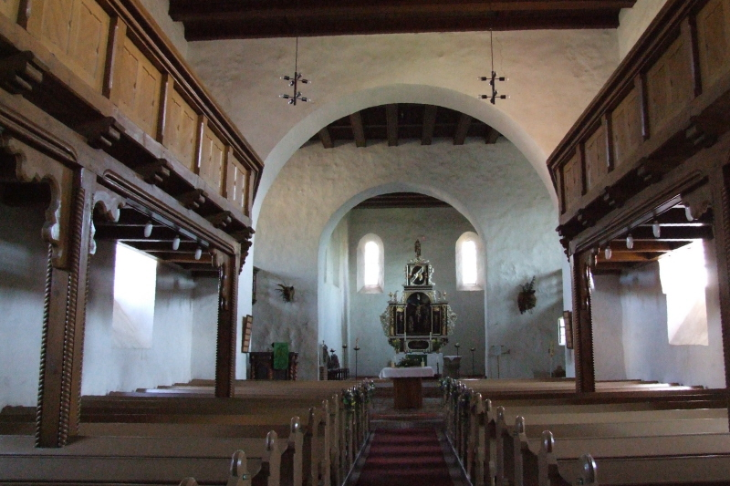 St. Georg Kirche in Arneburg